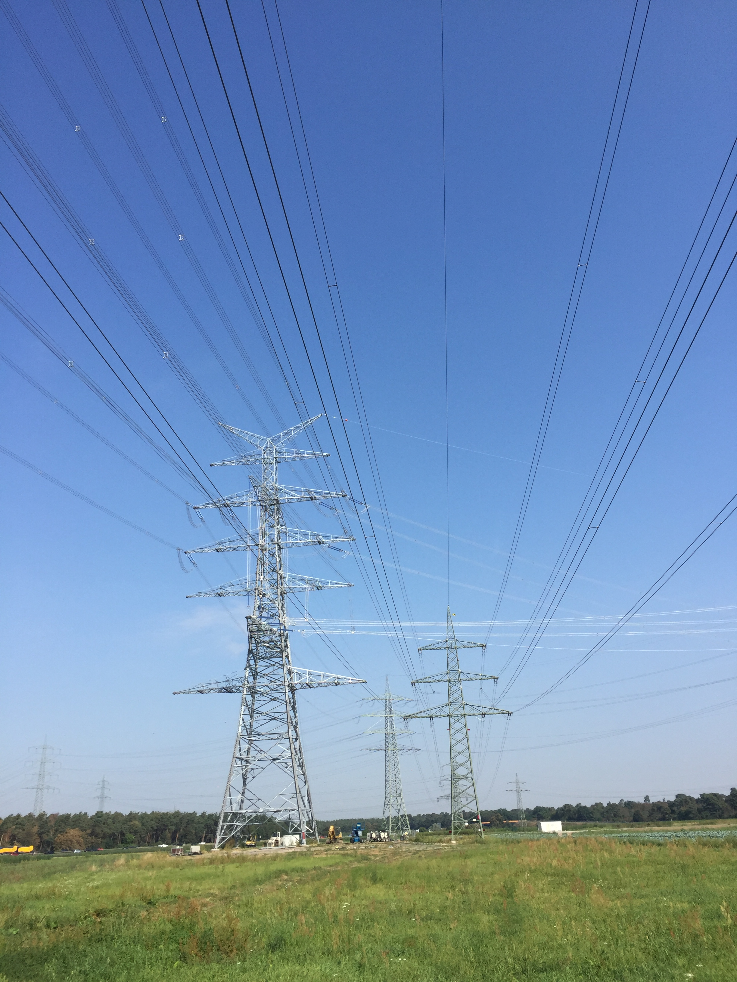 2016 errichteter Abzweigmast einer 380-kV-Leitung (Bl. 4591, Gräfenhausen–Urberach) westlich vom Umspannwerk Pfungstadt. Rechts daneben eine vierkreisige Bahnstromleitung der Deutschen Bahn.